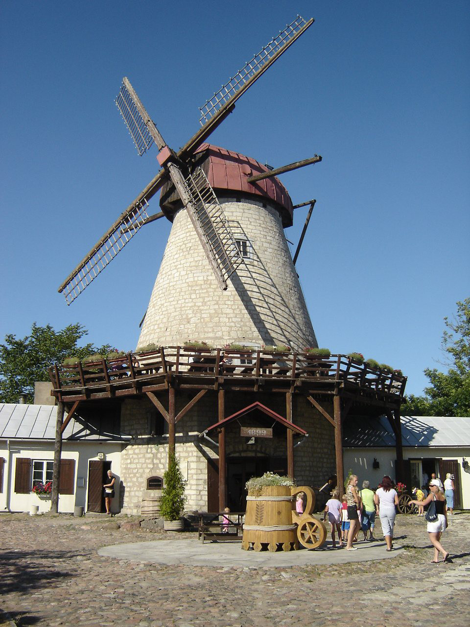 Veski trahter Kuressaares